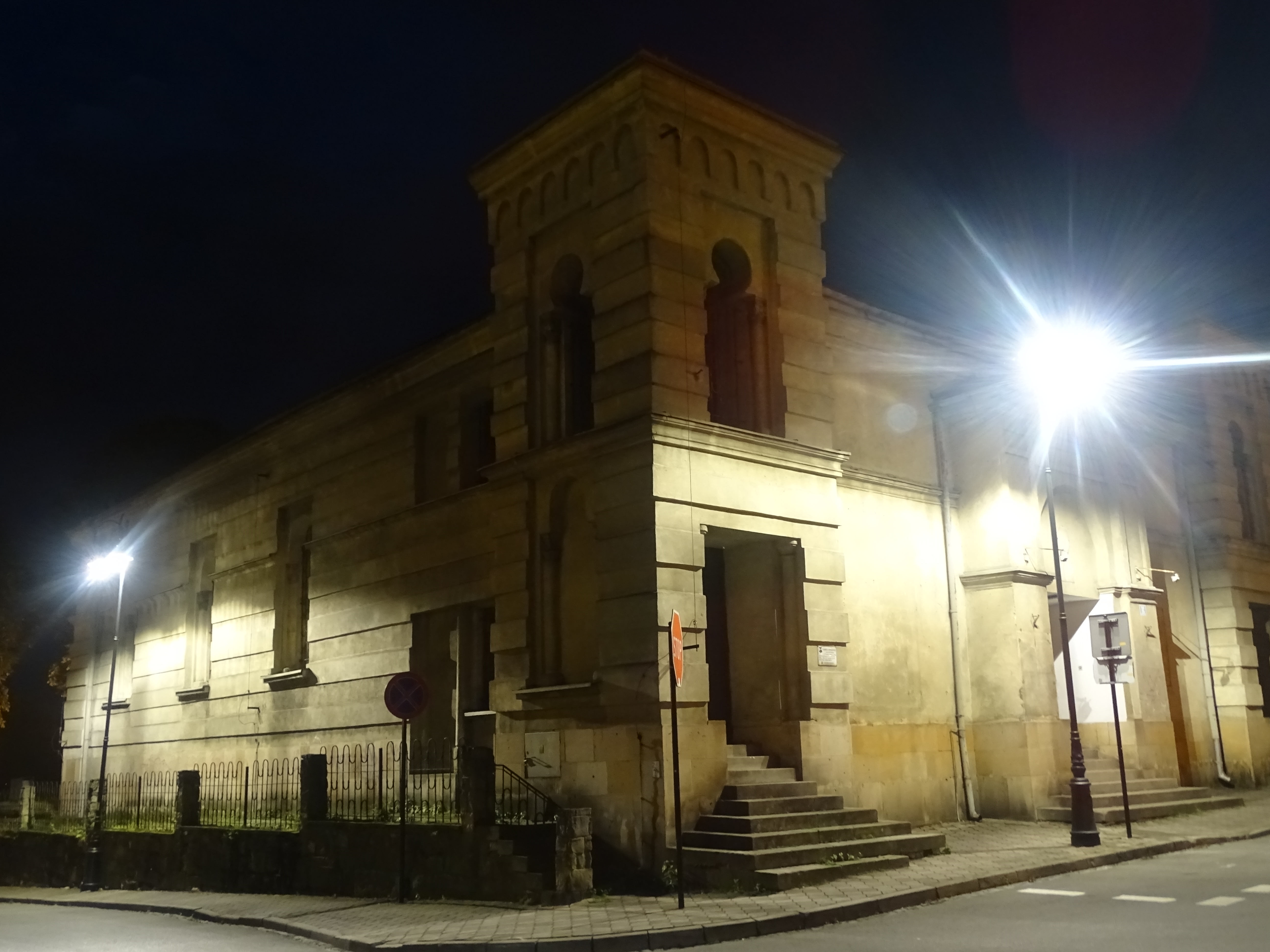 Synagoga nocą - 2016 rok